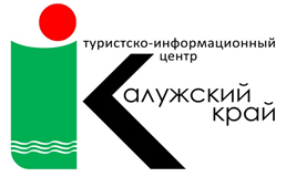 Логотип туристско-информационного центра "Калужский край"